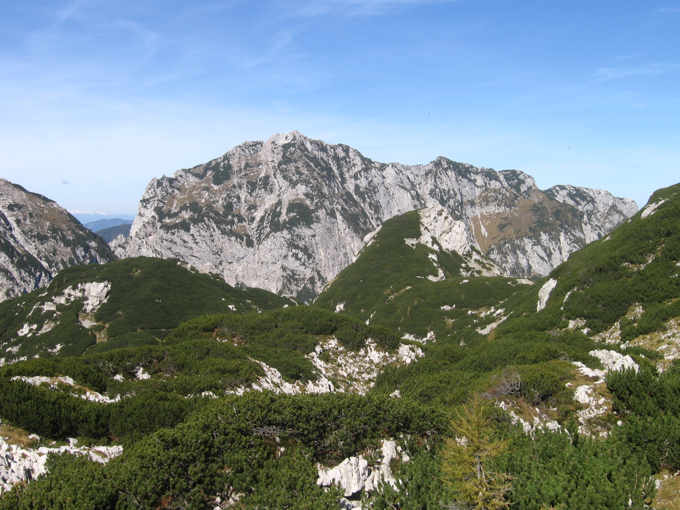 Mt. Krofička in Kamnik Alps from Molička planina, Slovenia